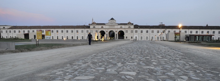 Parco archeologico Novi Ark